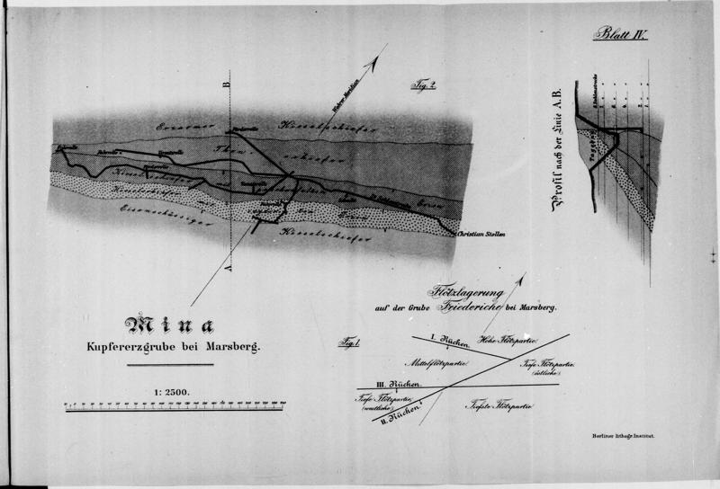 Grubenplan der Kupfererzgrube Mina bei Marsberg